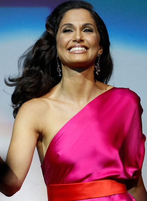 Camila Pitanga durante o 25o Premio da Musica Brasileira no Theatro Municipal. Foto: Roberto Filho (14/05/14)